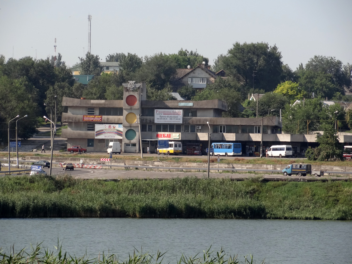 Васьевская автостанция